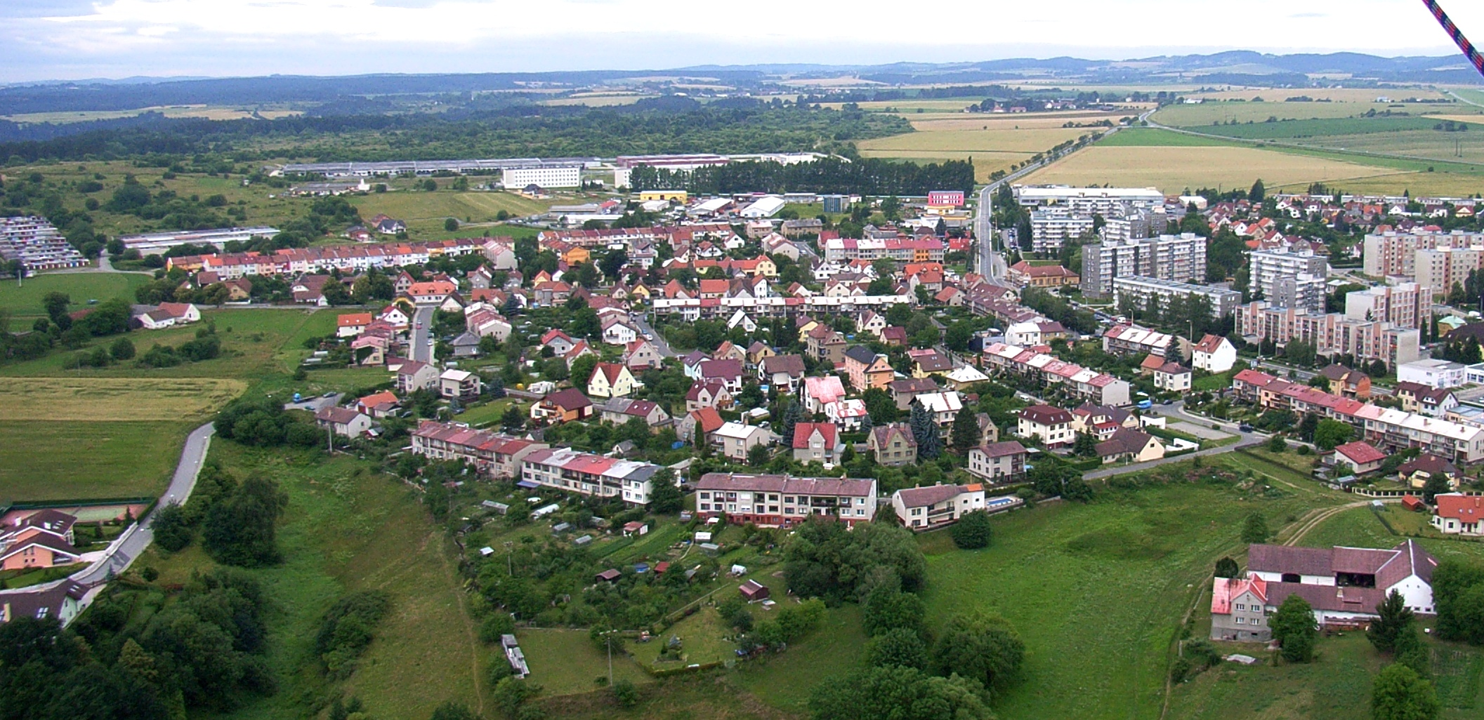 Tábor-místní část Klokoty (2007)